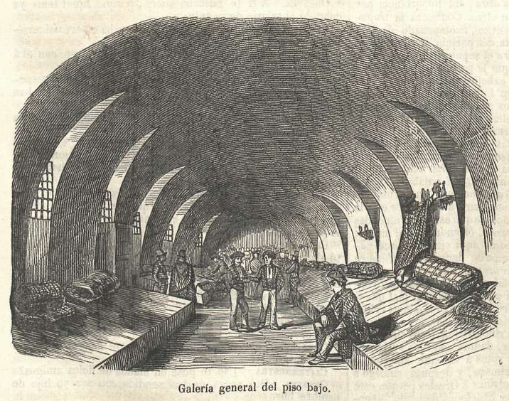 Galería general del piso bajo, cárcel del Saladero, en la revista española La Ilustración.